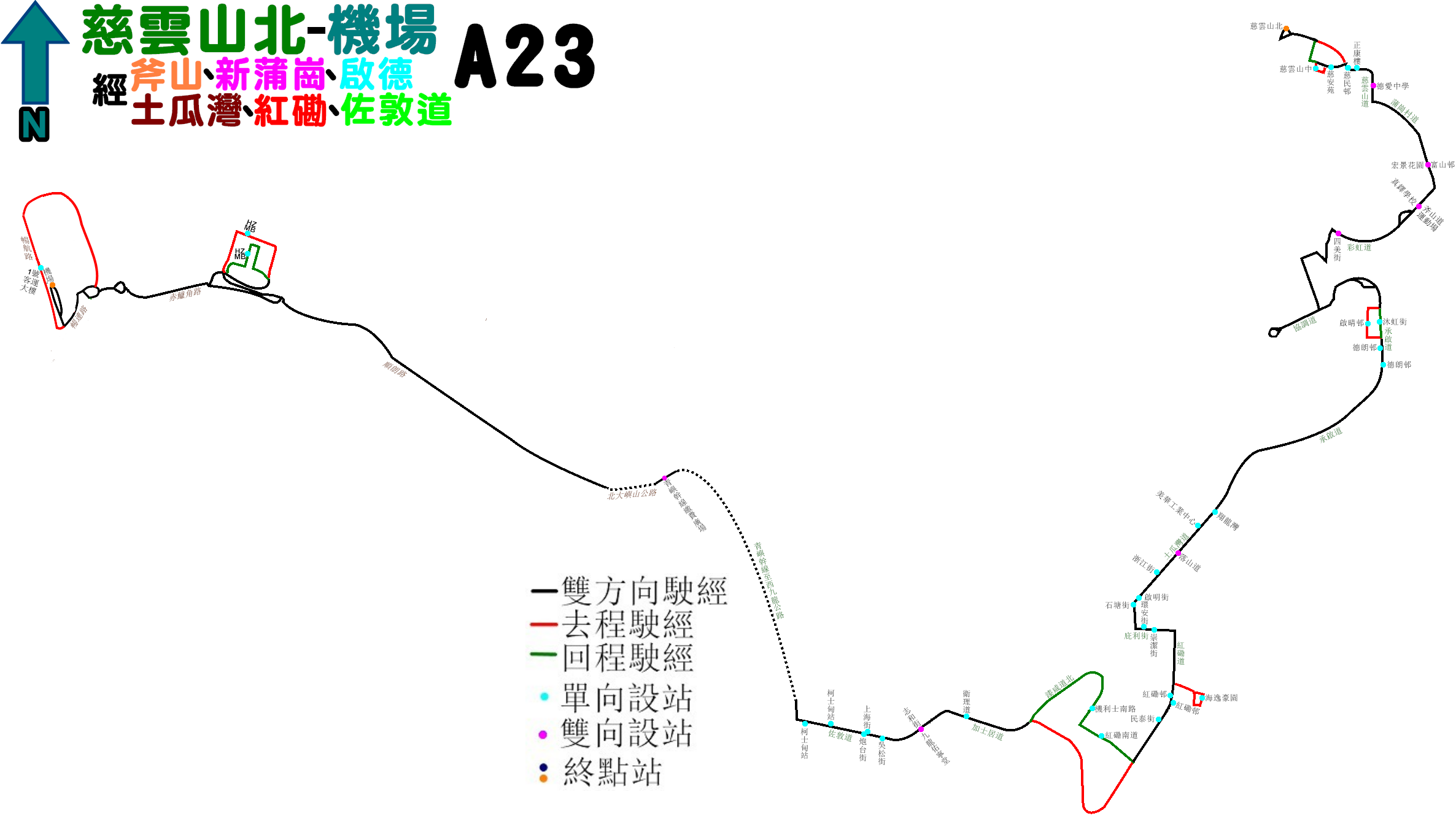 城巴機場快線A23線的走線圖